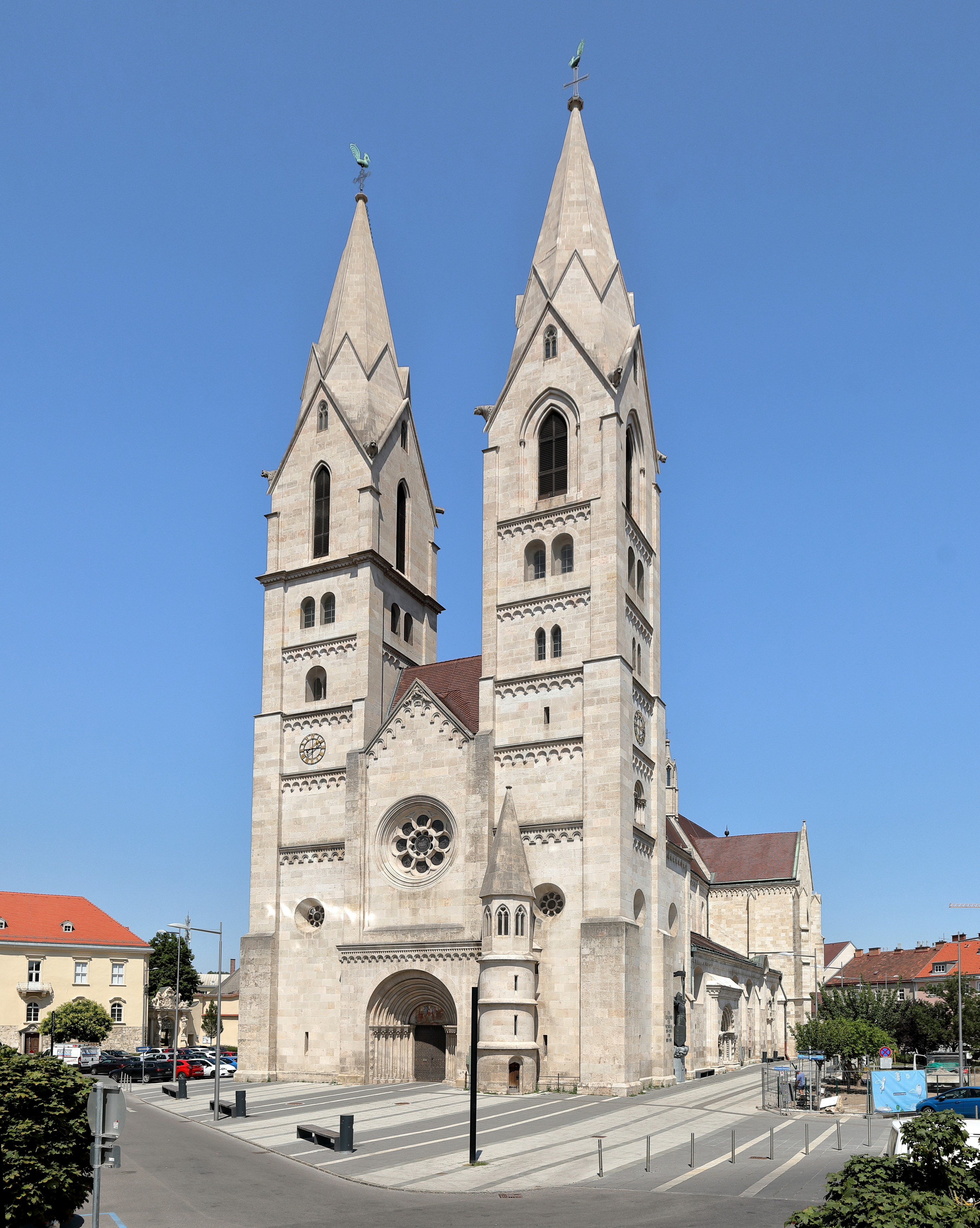 Südwestansicht des Domes Mariä Himmelfahrt in der niederösterreichischen Bezirkshauptstadt Wiener Neustadt.Das Langhaus mit dem Westturmpaar wurde von 1193 bis 1279 im spätromanischen-frühgotischen Stil errichtet. Im ersten Viertel des 14. Jahrhunderts wurde das Querschiff und der polygonale Chor mit den Seitenchören sowie eine zweigeschossige Sakristei im Norden errichtet. Unter Kaiser Friedrich III. erfolgten im 15. Jahrhundert Umbauten und eine Neuausstattung. Unter Bischof Ferdinand Graf von Hallweil wurde 1755 der Dom barockisiert. Nach einem Brand 1834 in der Glockenstube wurden die baufälligen Türme 1886 abgetragen und nach den alten Plänen unter der Leitung des Wiener Architekten Richard Jordan von 1892 bis 1899 wieder aufgebaut.